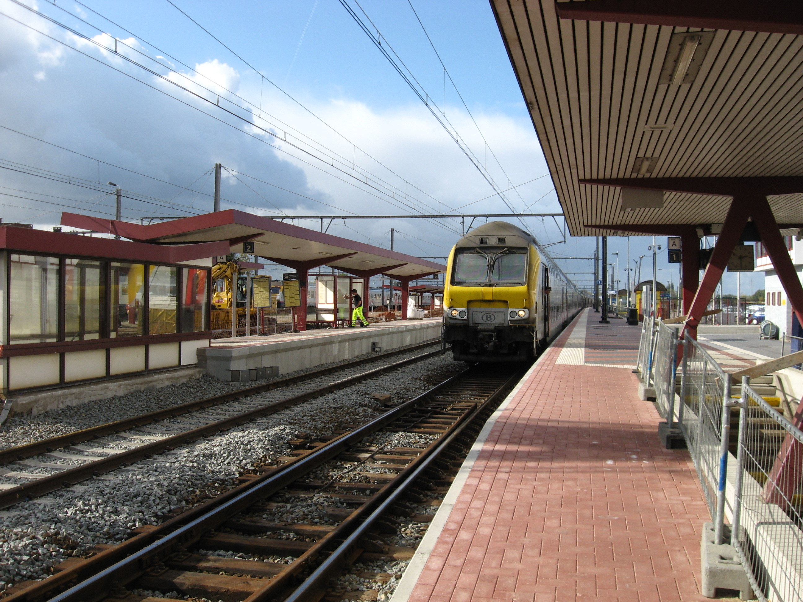 Trekduwtrein in Landen met stuurstandrijtuig